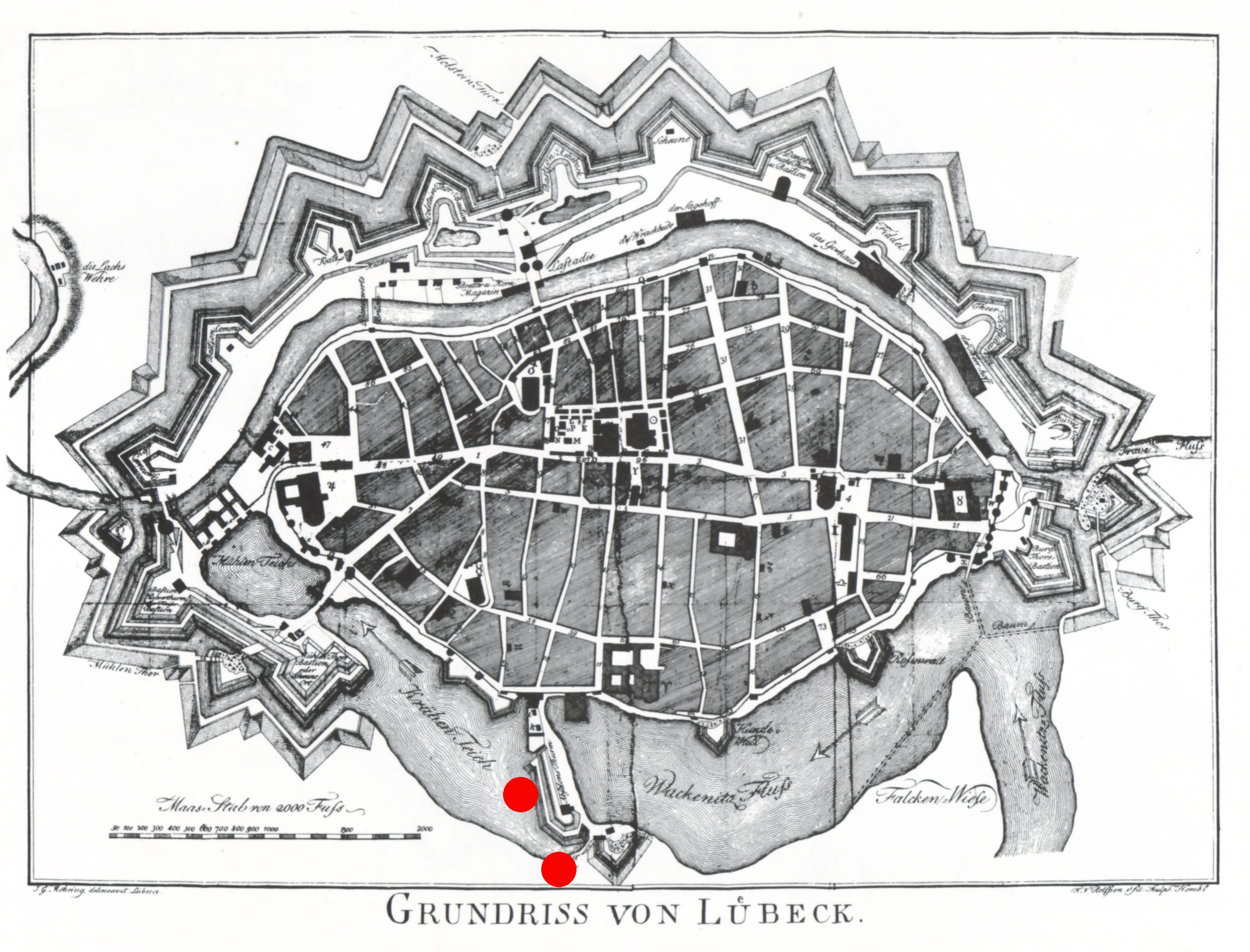 Ungefähre mögliche Standorte der Olausburg in Lübeck, markiert auf einem Stadtplan von 1787